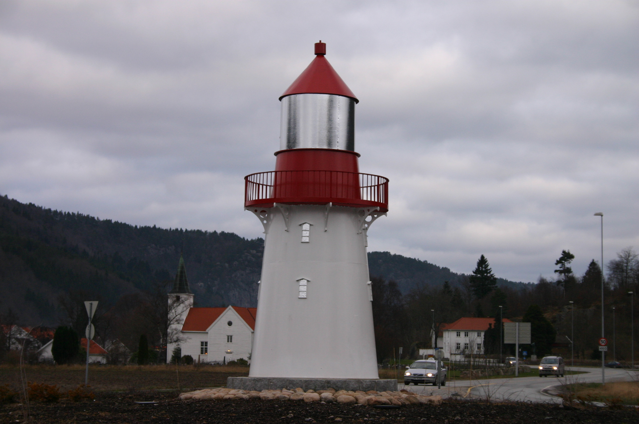 Modell av Lindesnes fyr i rundkjøringen på Vigeland i Lindesnes kommune.